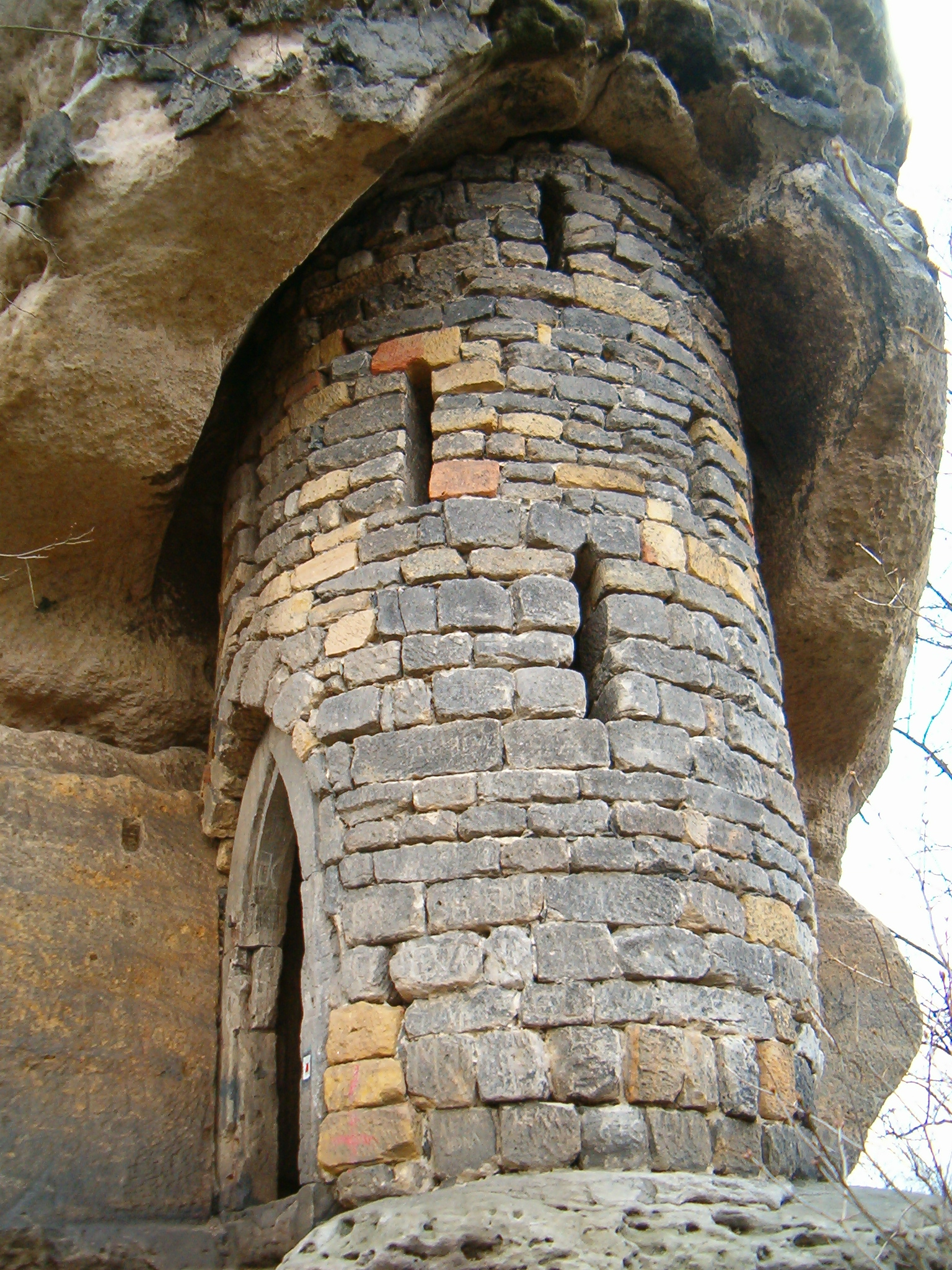 Hrad Jestřebí. Obec Jestřebí. Okres Česká Lípa. Česko.